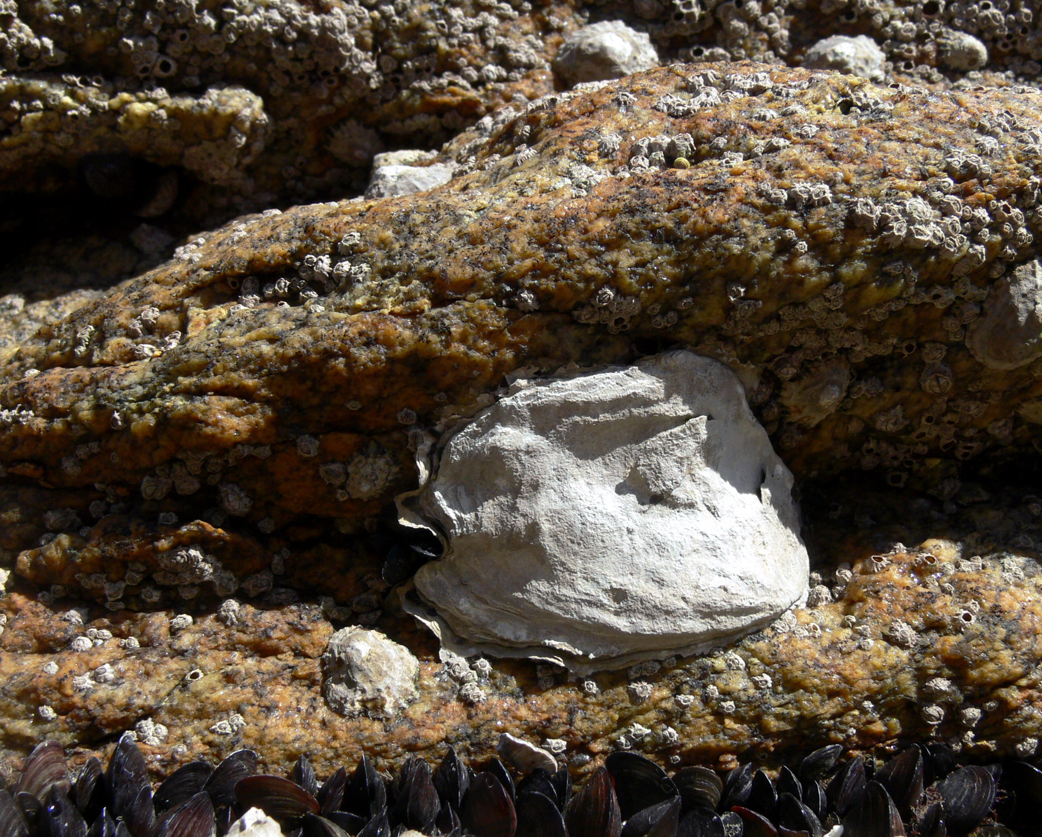 L'huître adapte la forme de sa coquille à celle de ses voisines ou de l'environnement rocheux; Bretagne sud (Baie de Quiberon)